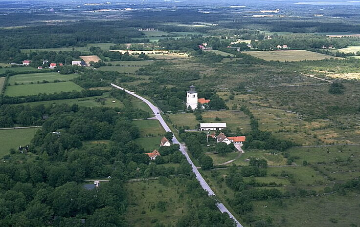 Fide kyrka i bildens mitt. Motiv: Fide Nyckelord: Flygbilder, Riksintressen Kategori: Miljöer, Odlingslandskap Fide kyrka i bildens mitt.